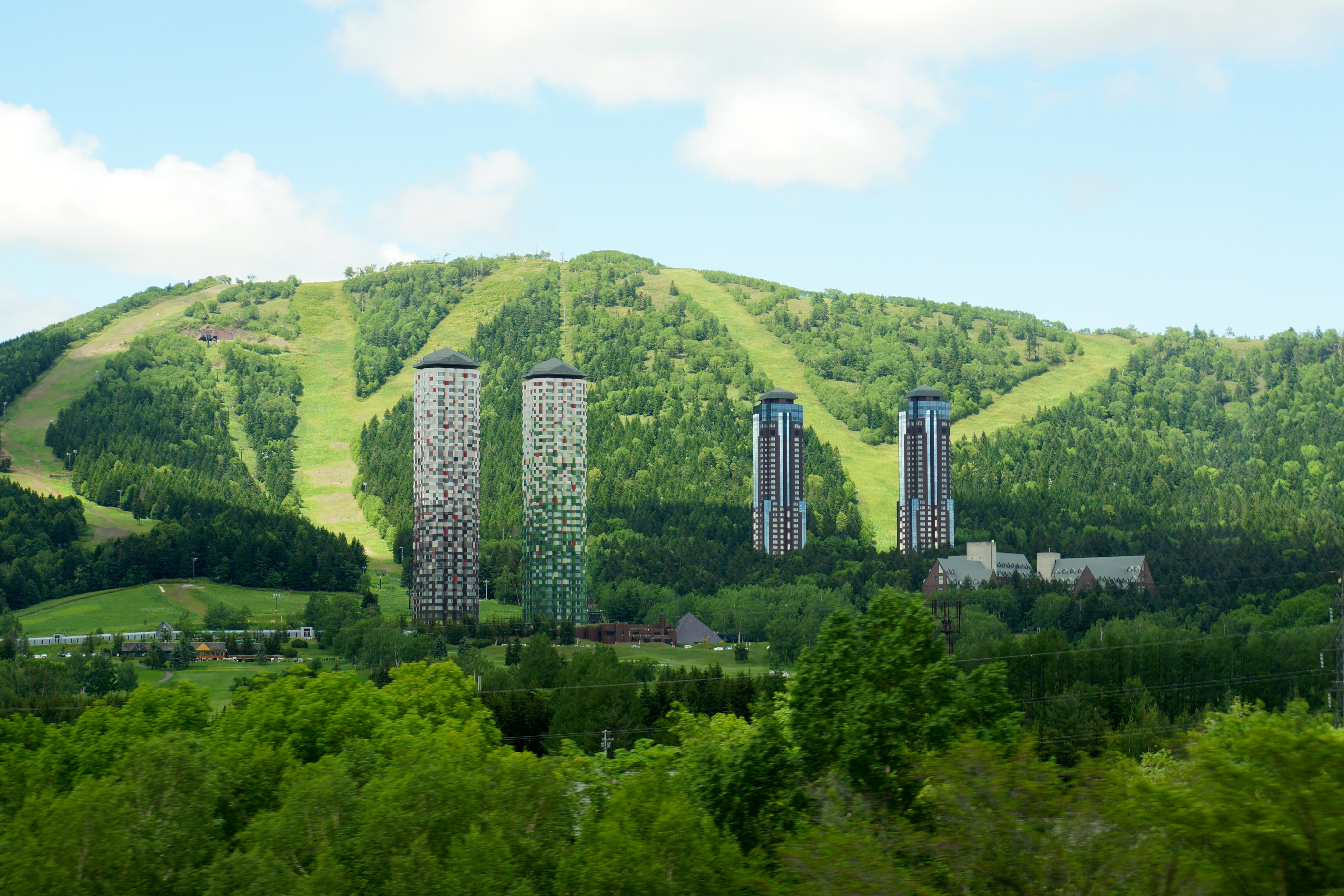 星野リゾート トマム Hoshino resorts tomamu the tower